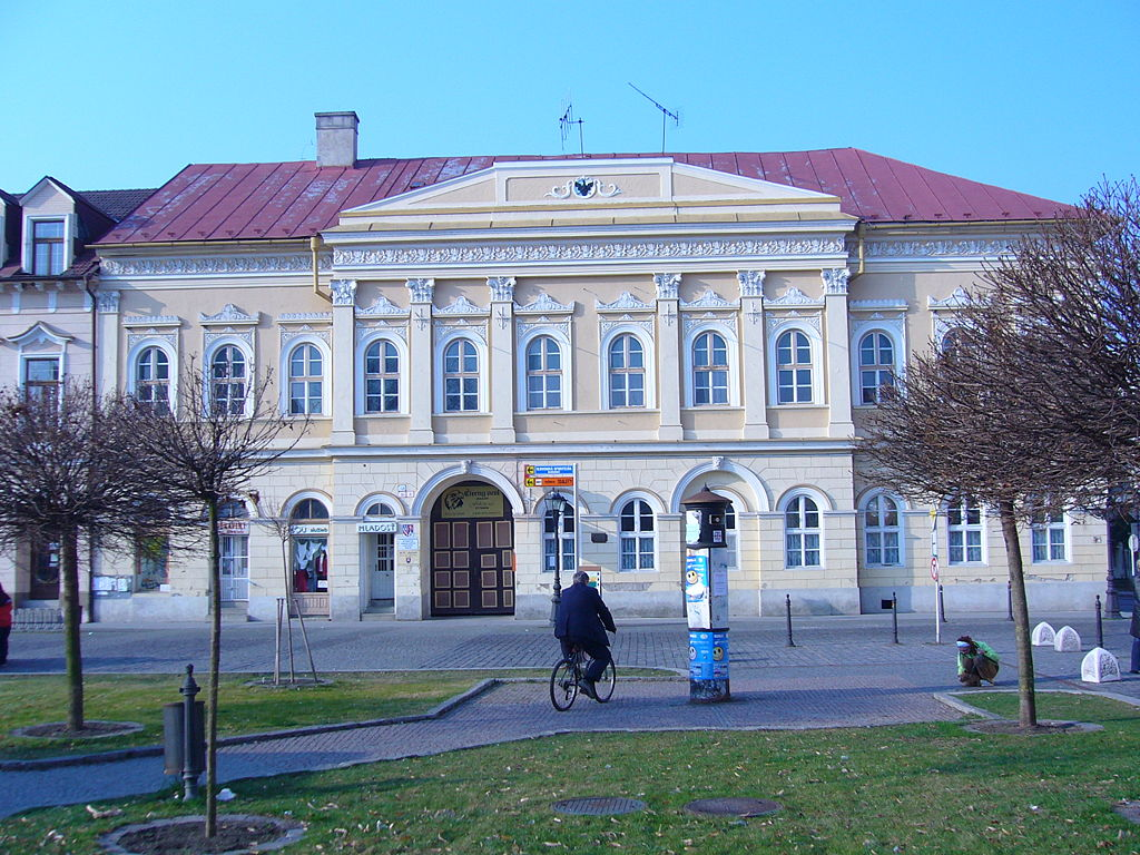 Az egykori megyei hivatal, majd pénzügyigazgatóság, majd kaszárnya épülete a Főtéren. Ma szakközépiskola. Miks Ferenc tervezte az 1840-es években a Fekete Sas szálloda épületeként.